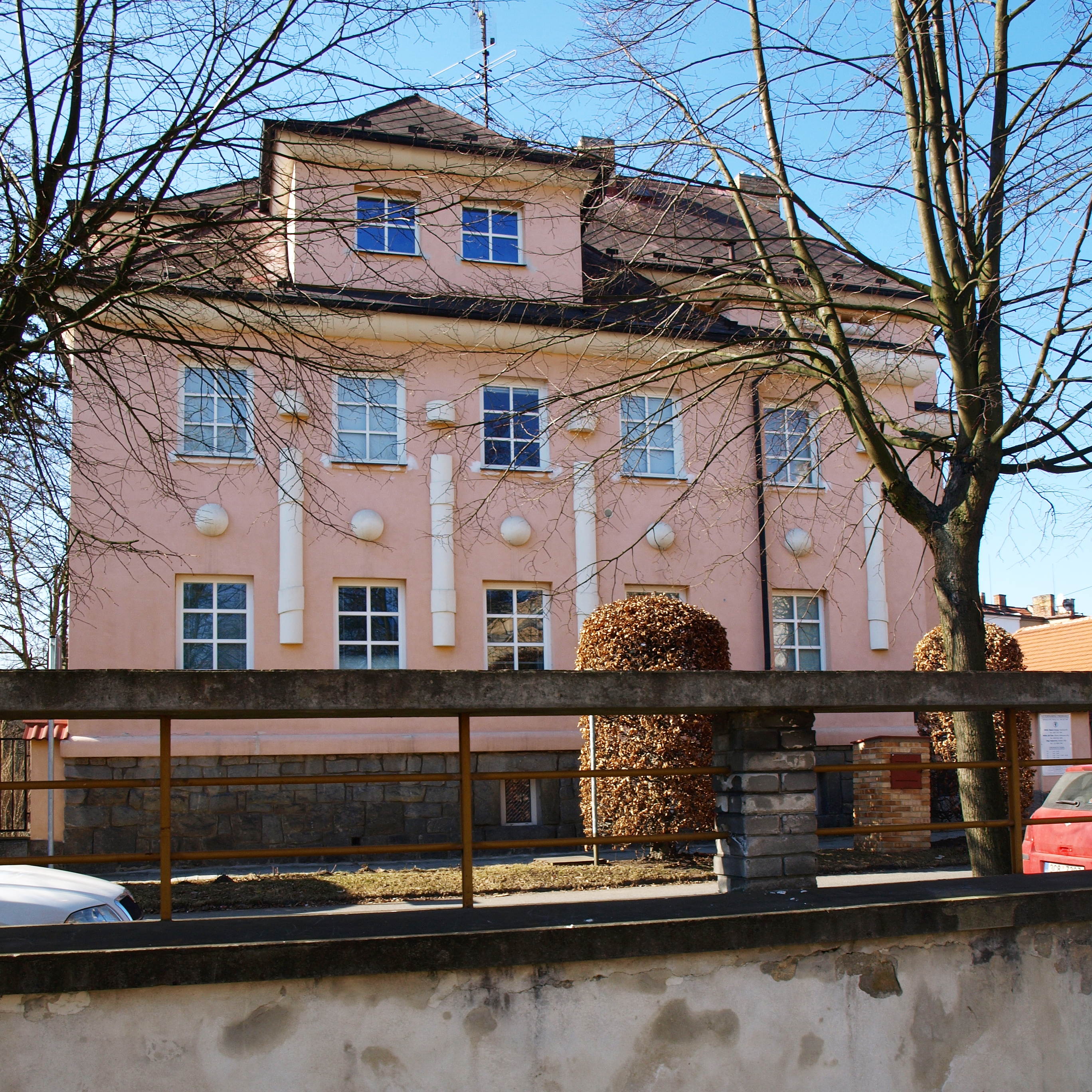 Böhmova vila, Böhmova 451, Blatná.